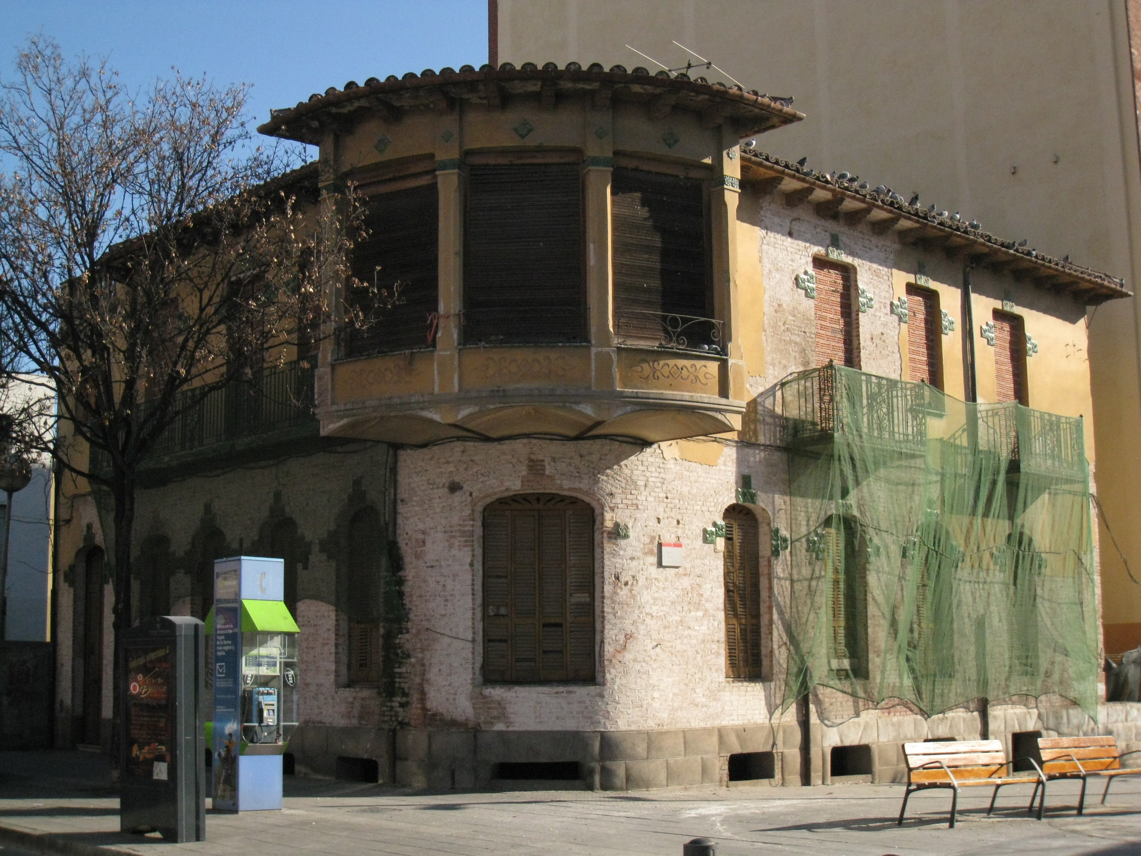 Habitatge al carrer Jaume I, 10 (Mollet del Vallès)